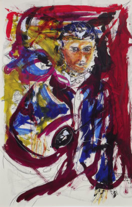 Lautréamont, Arnaud Courlet de Vregille (2012, Acrylique, 90 x 120 cm)